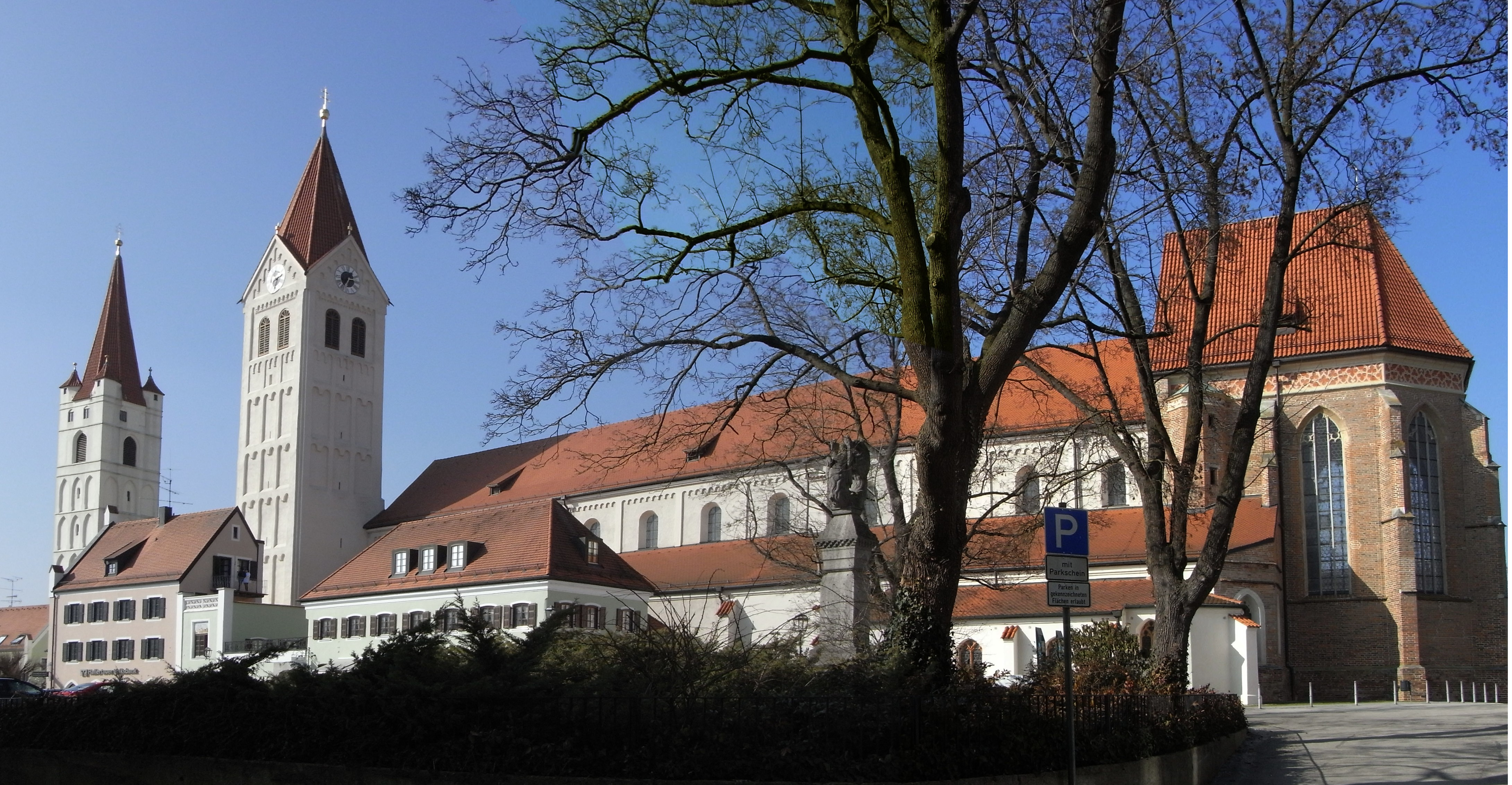 Moosburg an der Isar, Johanniskirche (links) und Kastuluskirche